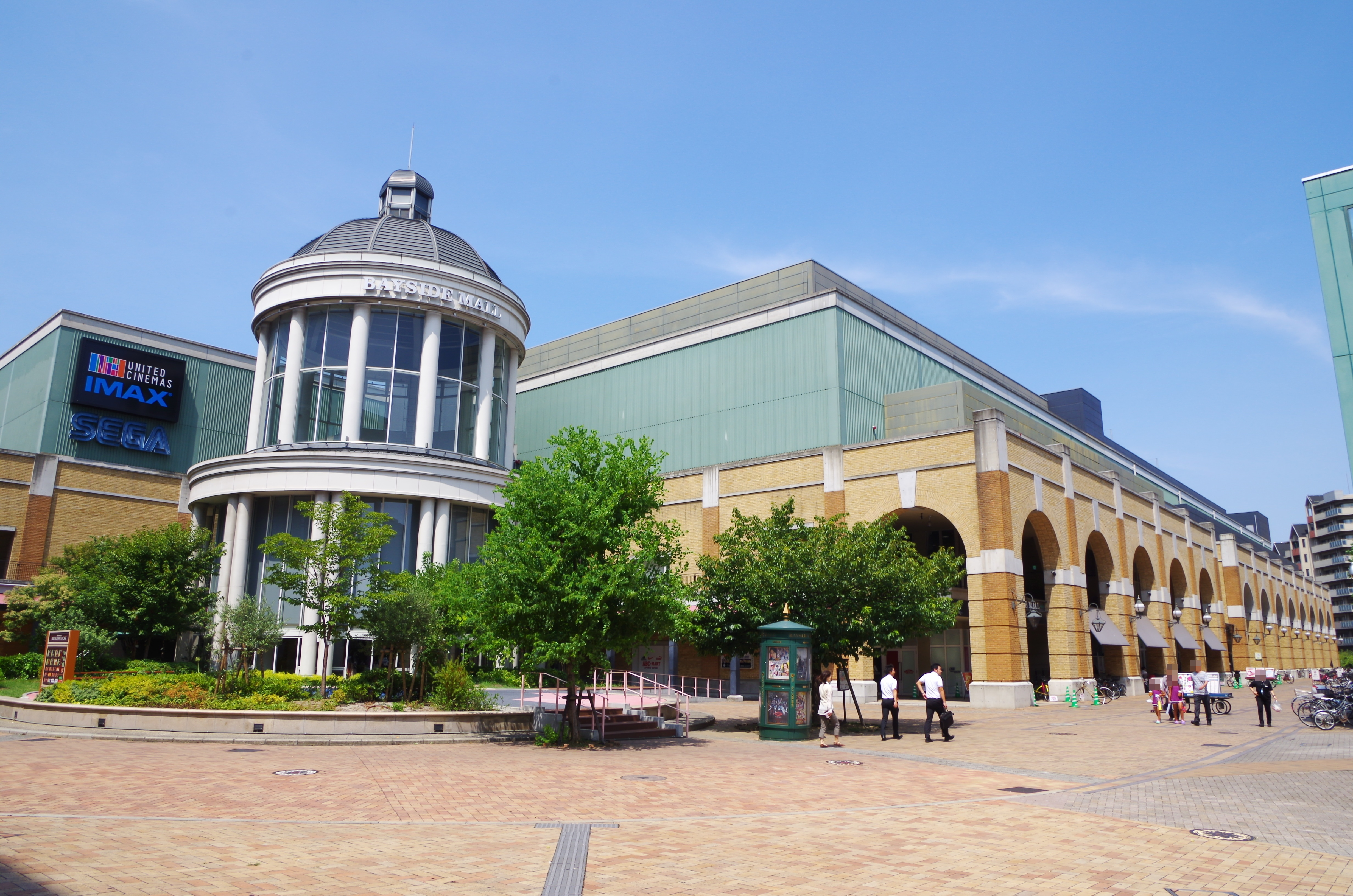 岸和田カンカンベイサイドモールWEST 2013.8.29